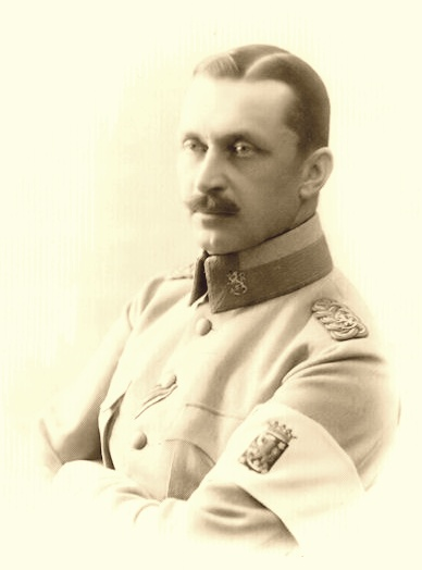 Kenraali Mannerheim vuonna 1918.